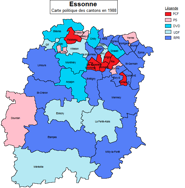 Carte politique des cantons de l'Essonne en 1988